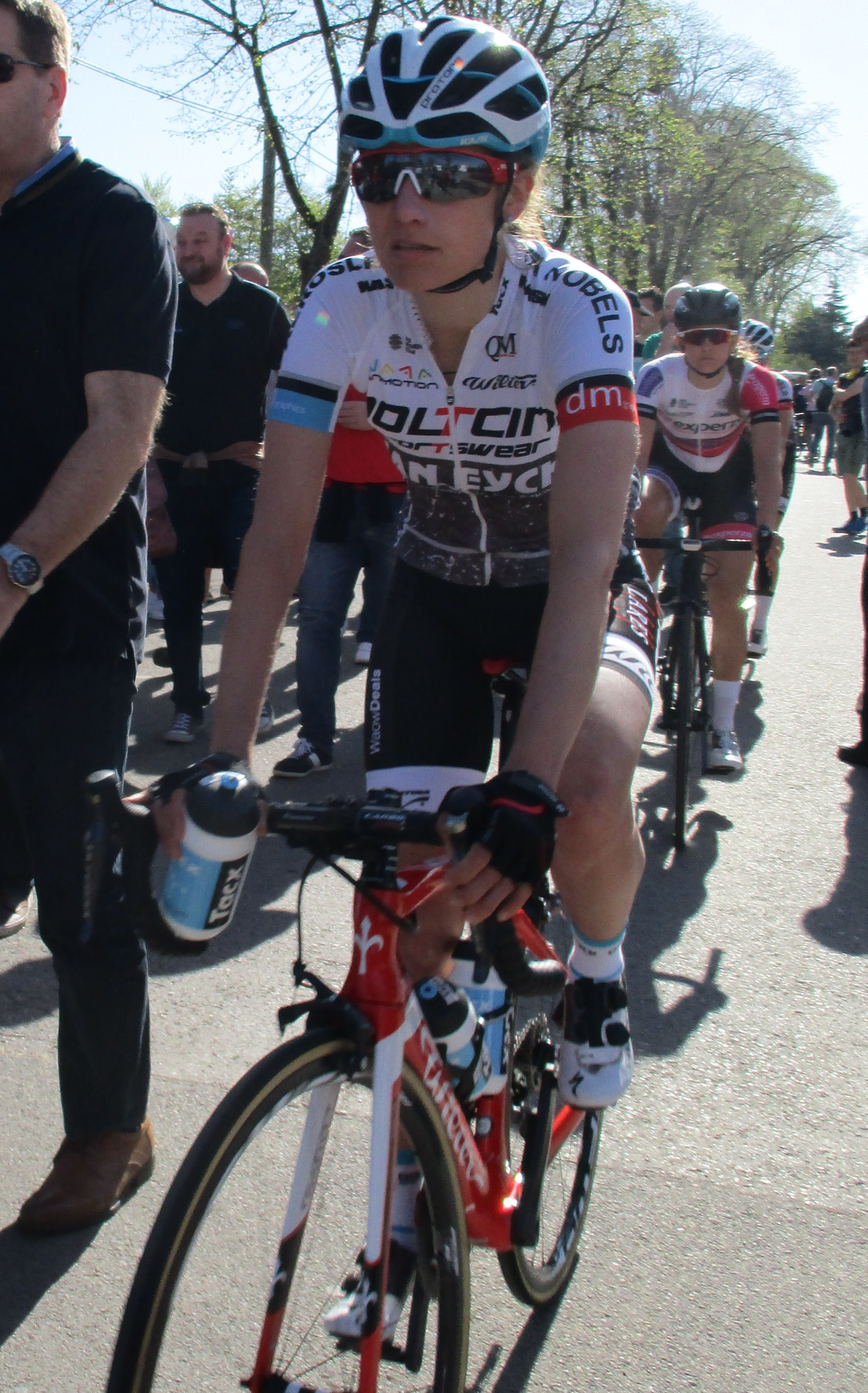 Start van de Waalse Pijl 2018 op de Mur van Huy.